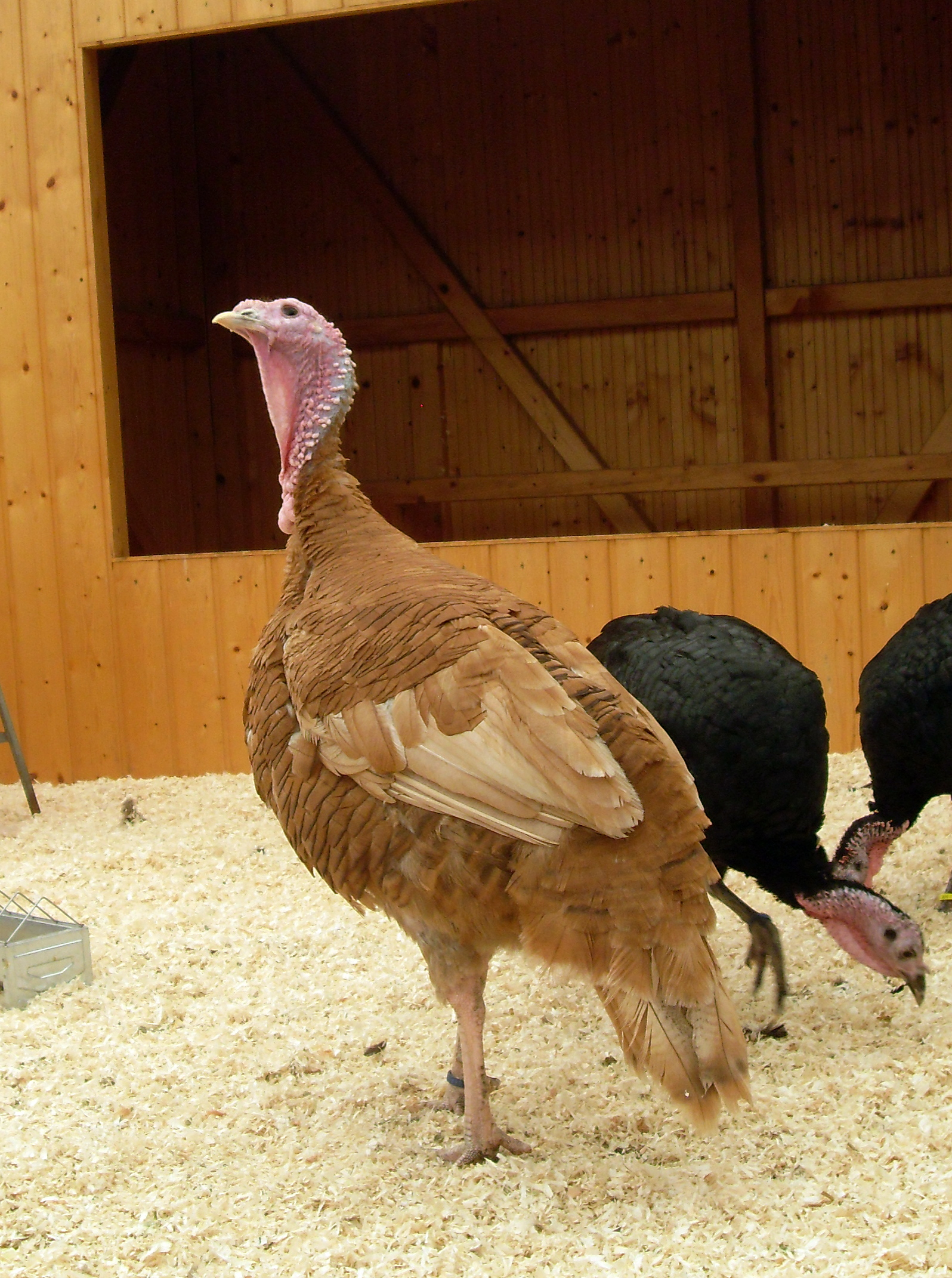 Deutsche Puter